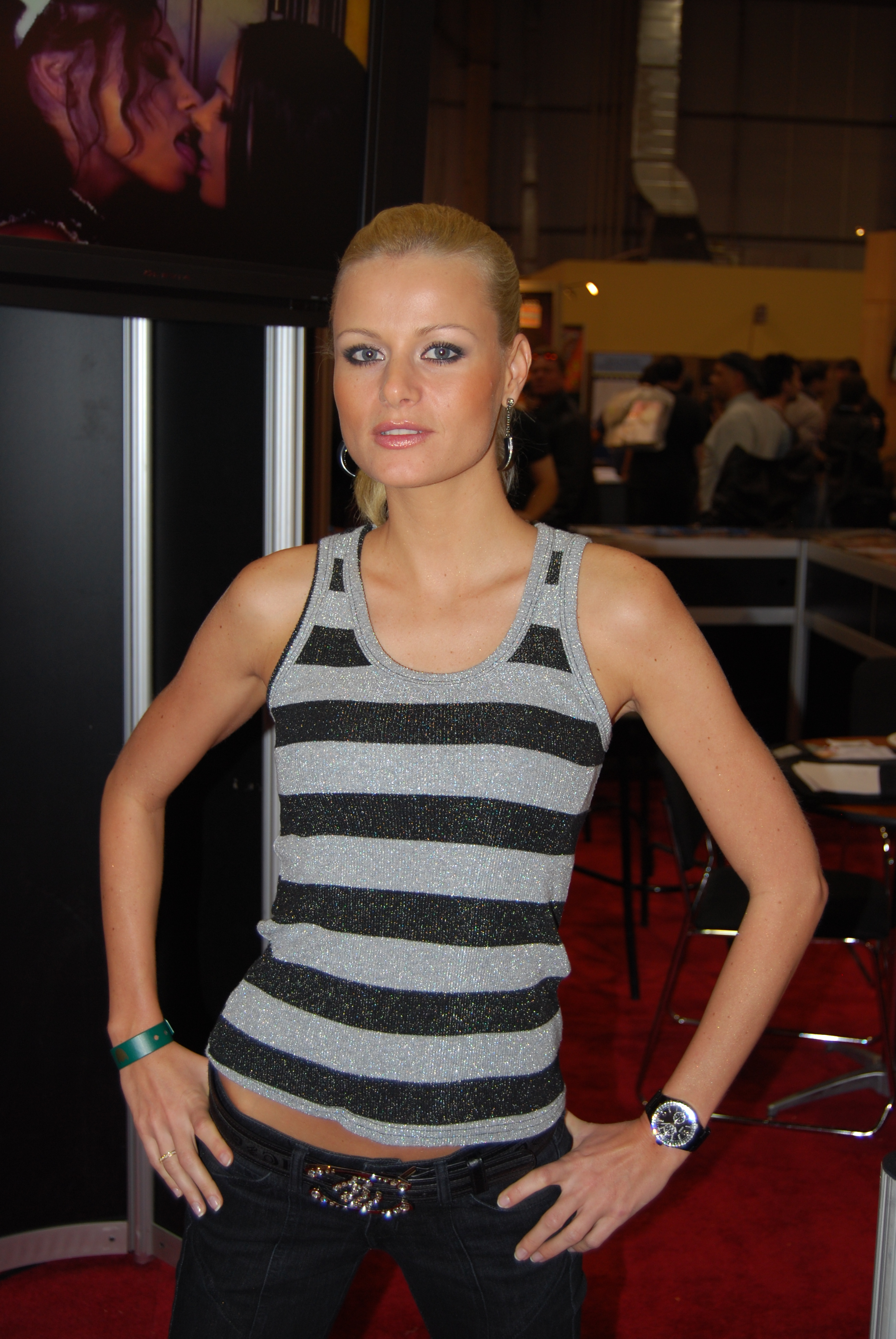 AEE2008_Nikon_Day2 408